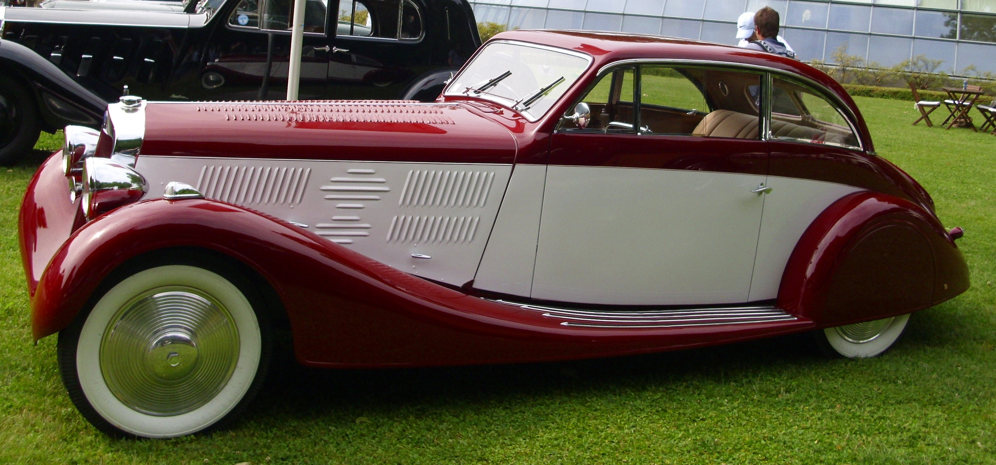 Delage D 8-105 S von Autobineau 1935